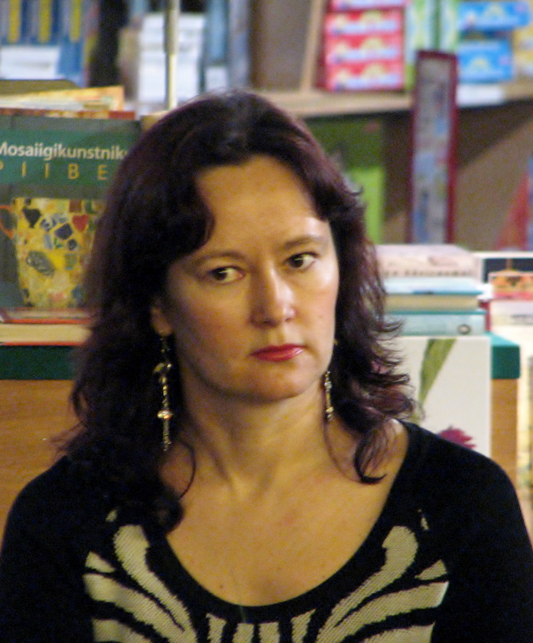 Tiina Laanem Imbi Viiroki raamatu "Teadlik tutvumine. Uus lähenemine õige kaaslase leidmisele" esitlusel Rahva Raamatus